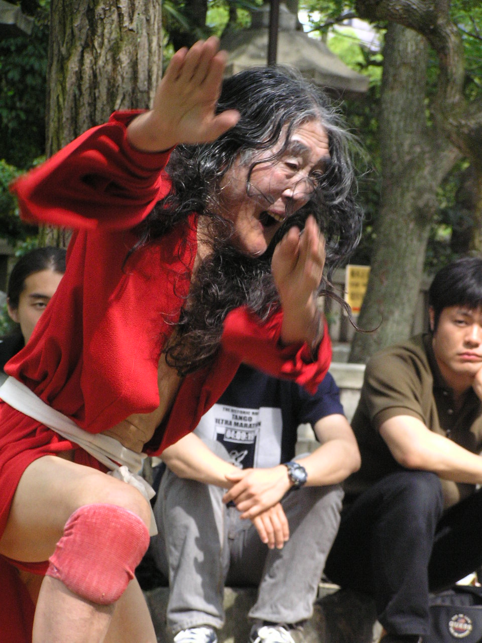 ギリヤーク尼ヶ崎